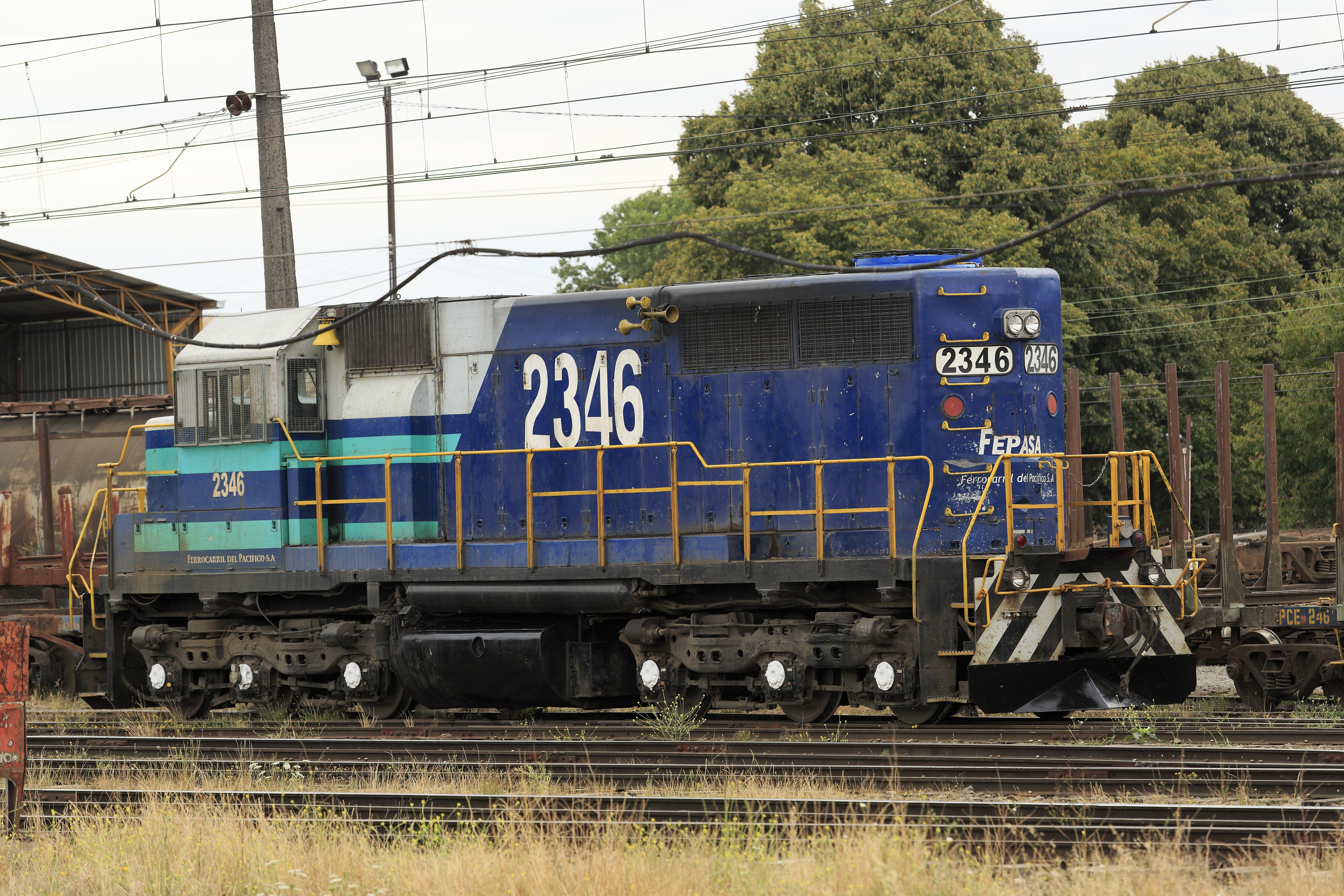 Typisch amerikanischer Stil, wegen des regelmäßigen Fahrens in Mehrfachtraktion stellt die einseitige Lage des Führerstandes kein Problem dar. Die Fahrtrichtung mit dem Maschinenvorbau voraus wird als »rückwärts« angesehen.Gebaut wurden die nur zehn sechsachsigen SDL39 1969 und 1972 von EMD in Regelspur für die Milwaukee Road, die sie für den Rangierdienst und Nebenstrecken mit geringer zulässiger Achslast benötigte. Mit der Anpassung an chilenische Verhältnisse änderte sich die Typenbezeichnung in SD39-2M.